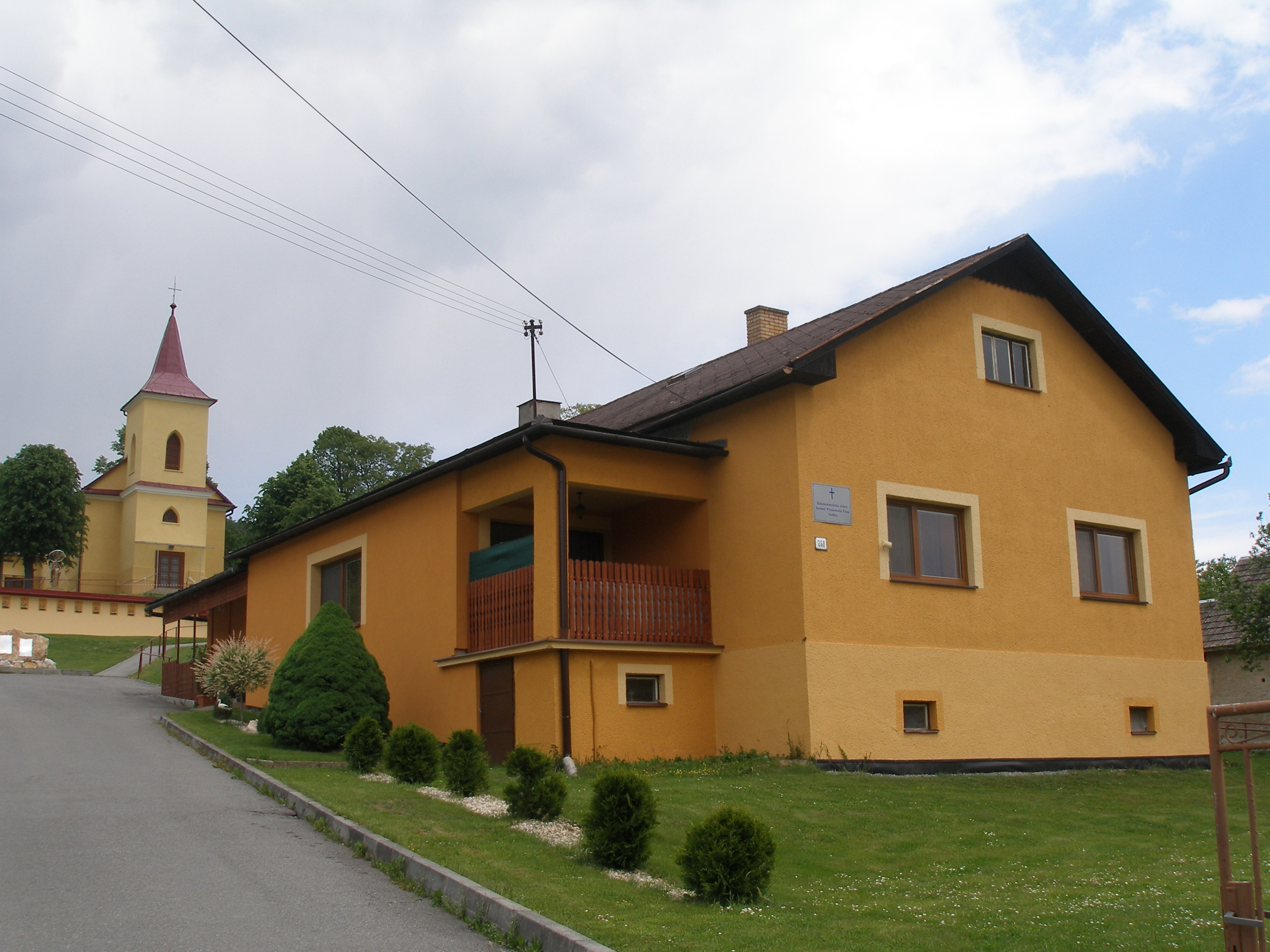 Obes Sedlice miestny kostol a farský úrad.